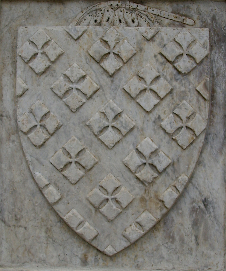 Smn stemma cavalcanti